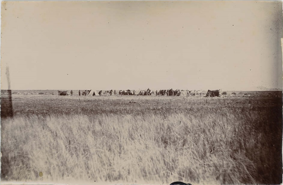 Campamento de los Rifleros del Chubut ca.1885